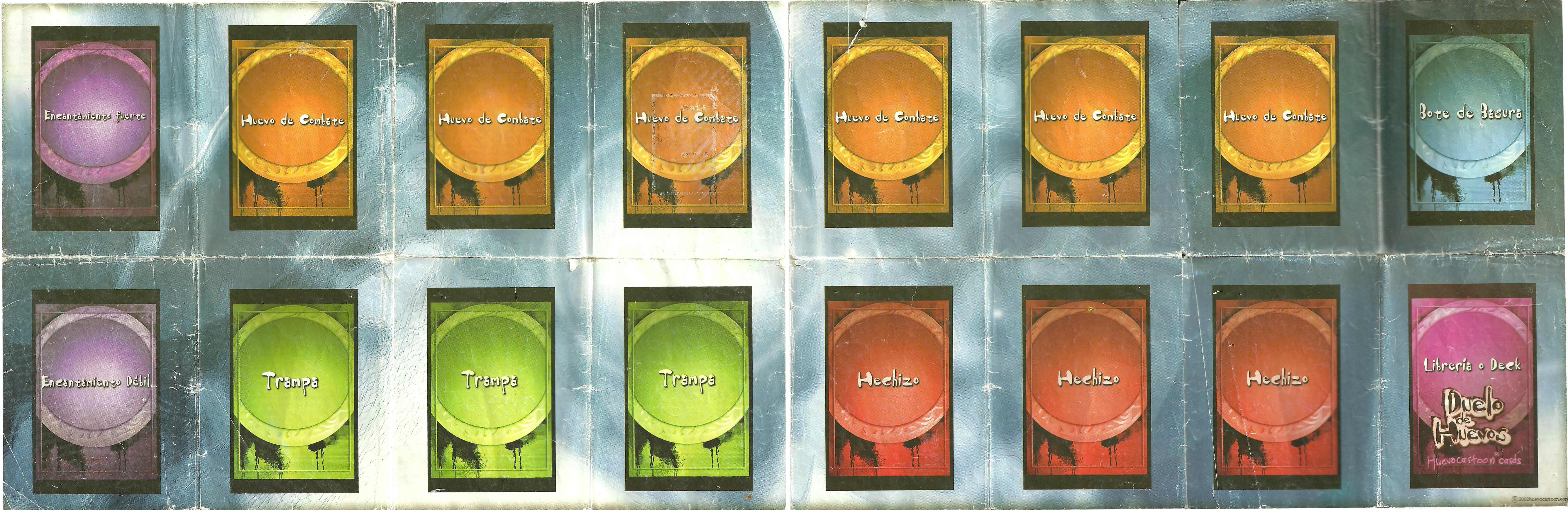 Con 10 sobres y 10 pesos obtenías este tablero